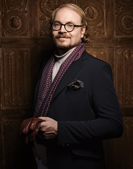 Underhållaren och språkforskaren Fredrik Lindström.